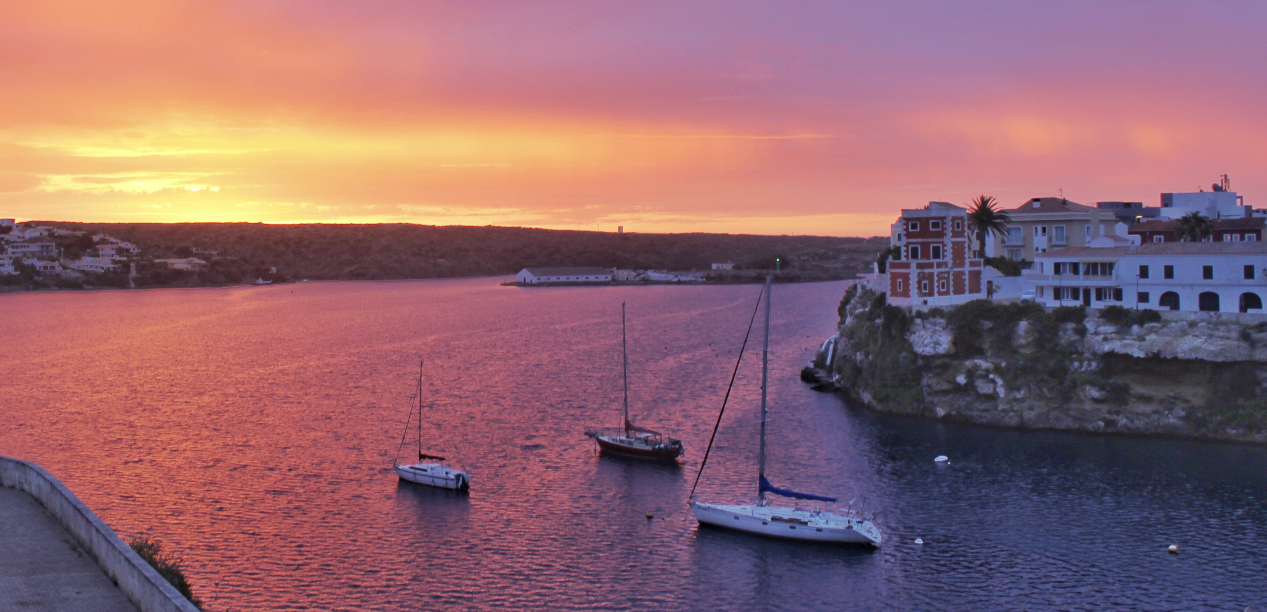 Sunrise at Cala Corb, Es Castell, Menorca